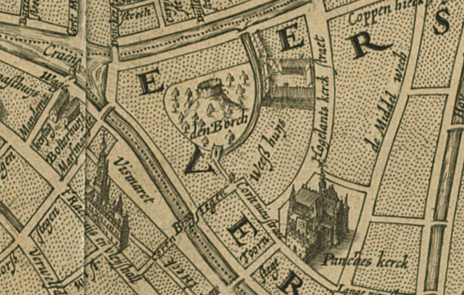 Detail van de kaart van Leiden (1614) van Jan Pietersz. Dou